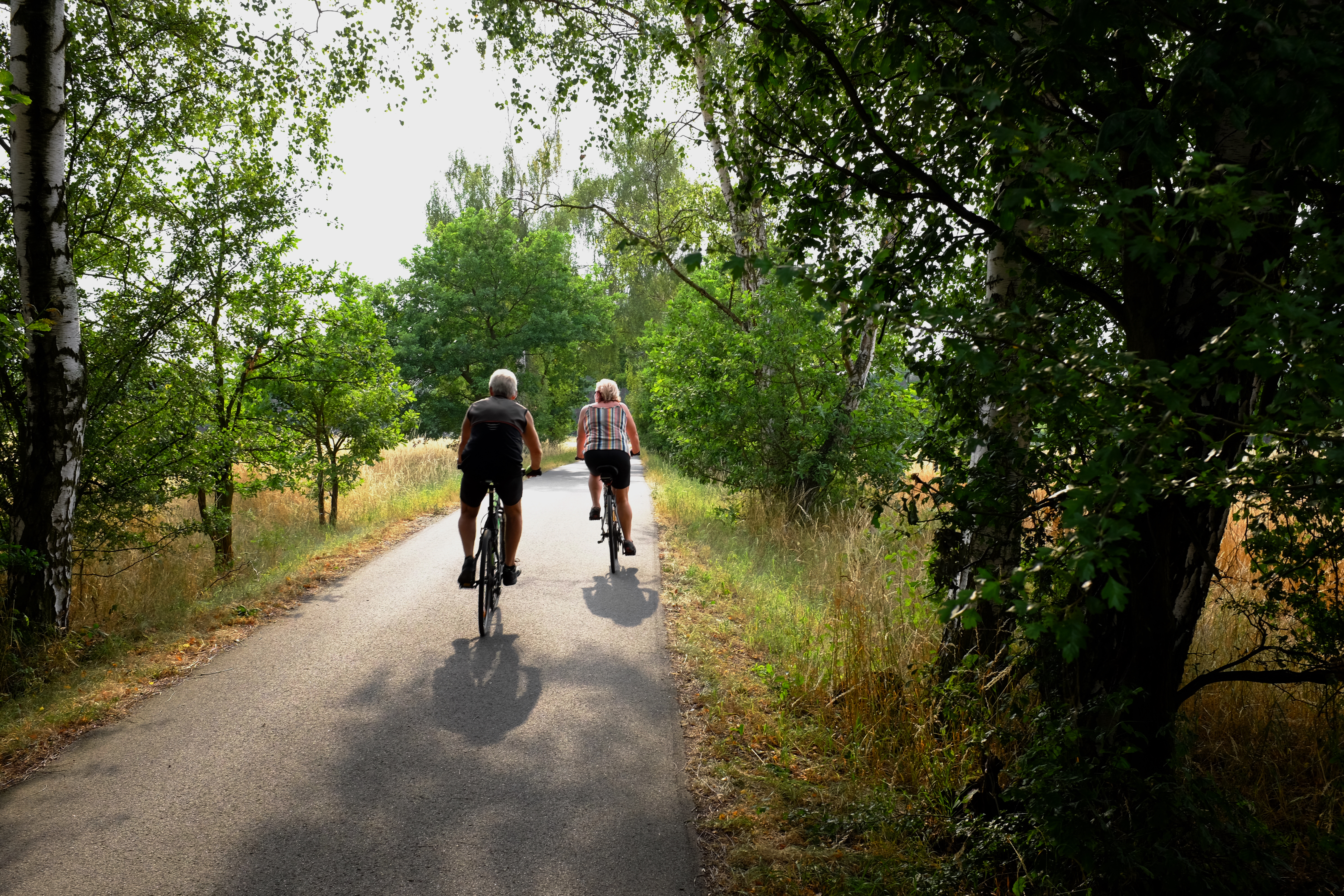 Cyklostezka Ohře u Nebanic, okres Cheb